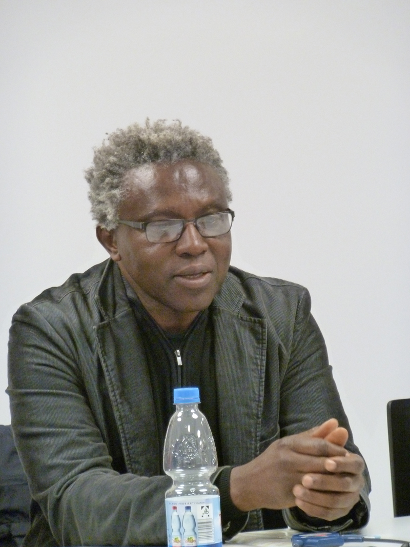 portrait de Jean-Marie Teno